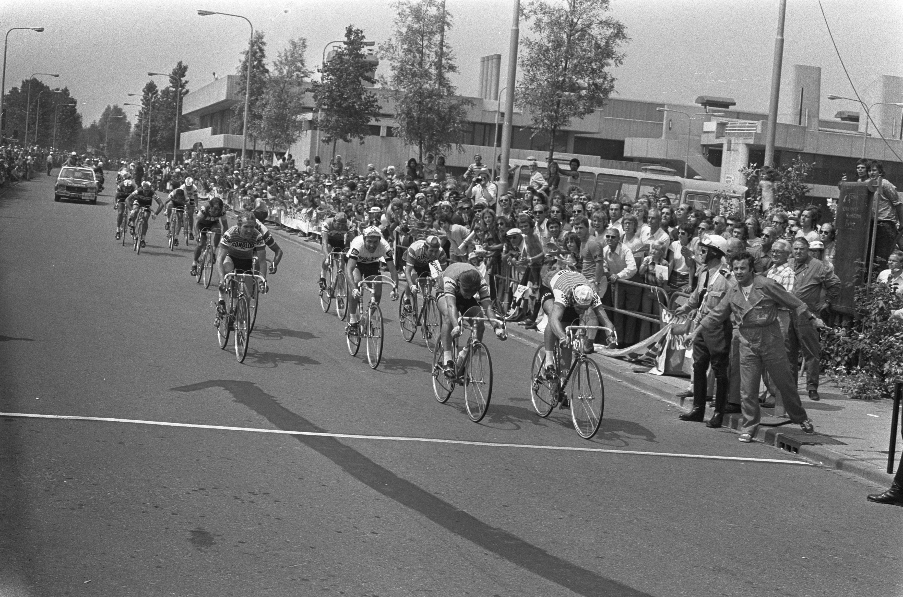 Collectie / Archief : Fotocollectie Anefo Reportage / Serie : [ onbekend ] Beschrijving : Finish eerste etappe Tour de France , Scheveningen naar Rotterdam, de Belg Willy Teirlinck gaat als eerste over finish Datum : 1 juli 1973 Locatie : Rotterdam, Scheveningen Trefwoorden : etappe, wielrennen Instellingsnaam : Tour de France Fotograaf : Verhoeff, Bert / Anefo Auteursrechthebbende : Nationaal Archief Materiaalsoort : Negatief (zwart/wit) Nummer archiefinventaris : bekijk toegang 2.24.01.05 Bestanddeelnummer : 926-5193